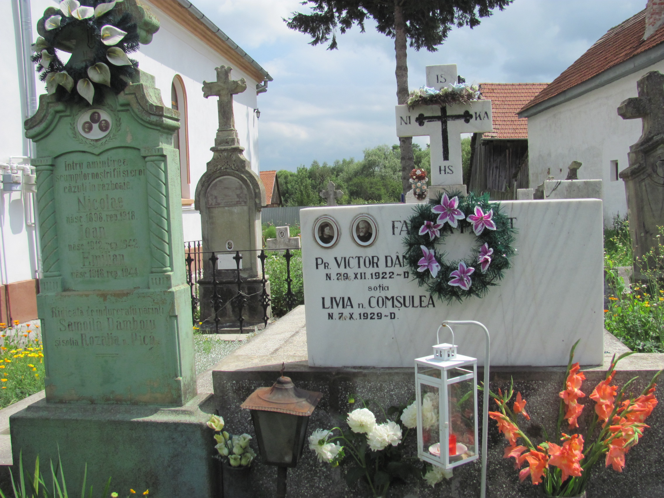 Satul Râuşor - Placă comemorativă Pr. Victor Dâmboiu